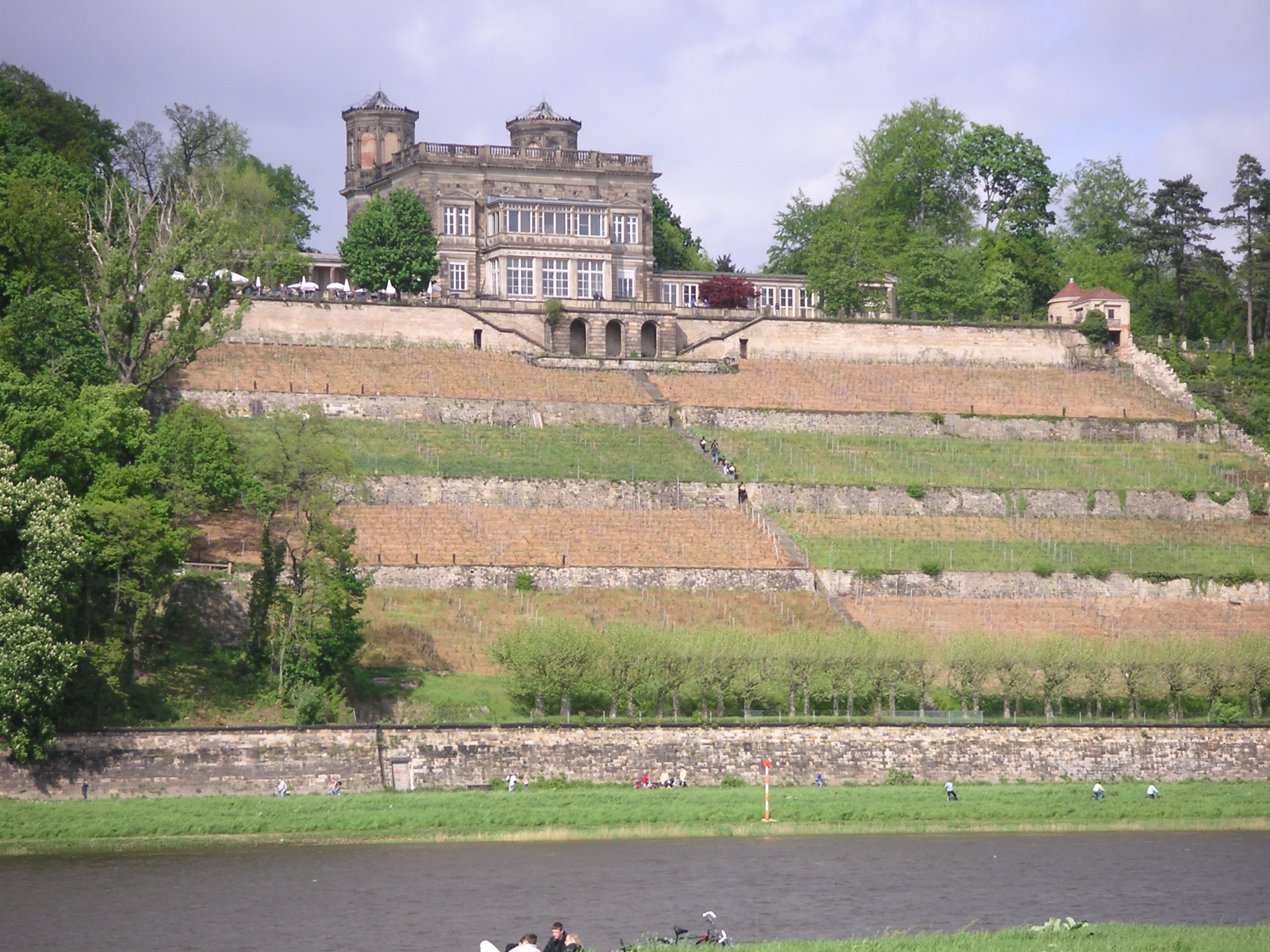 Dresden Lingnerschloss (Villa Stockhausen) Drei-Elbschloesser